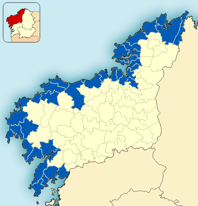 Concellos de la costa coruñesa.